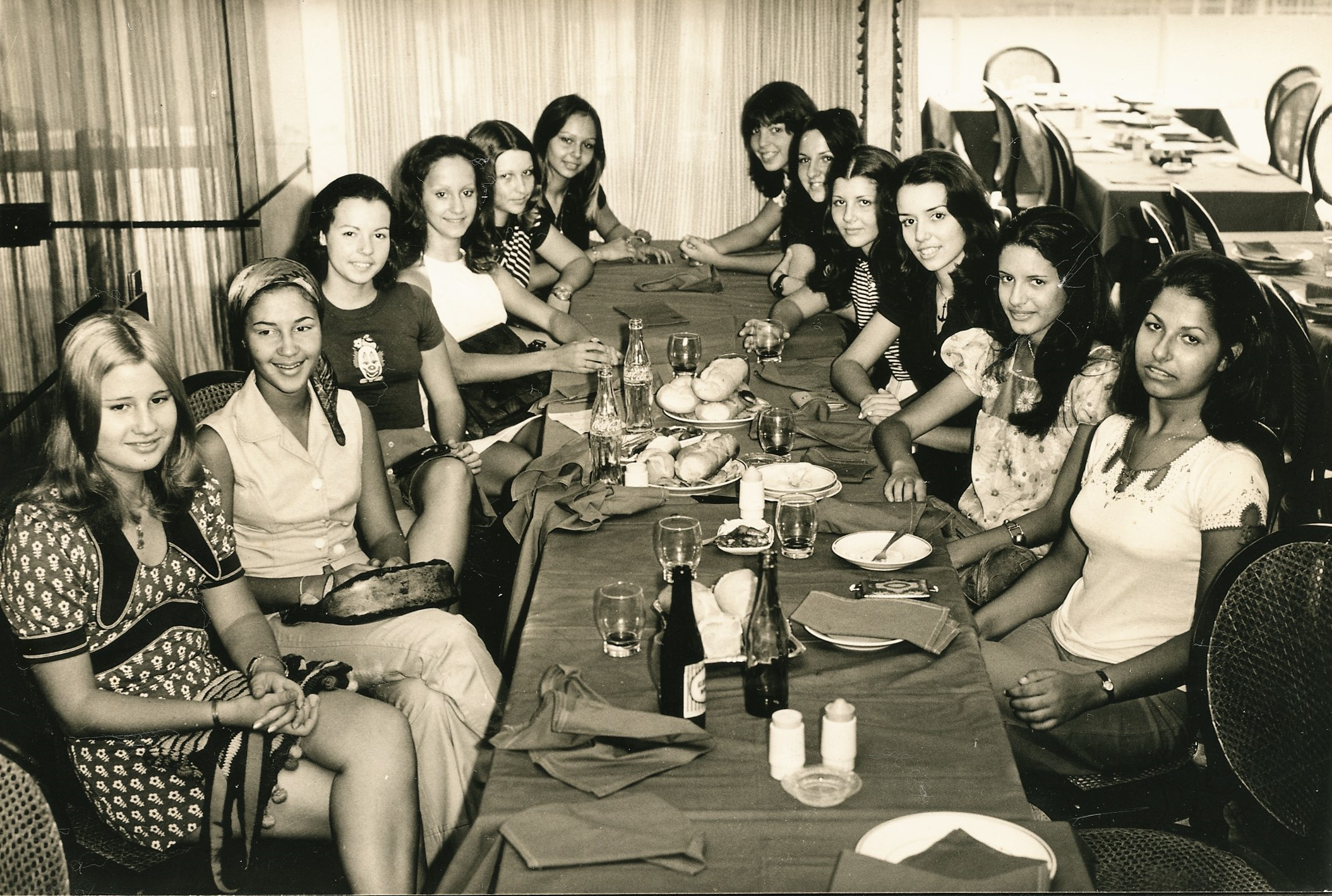 Fotografia do Fundo Correio da Manhã, sob a guarda do Arquivo Nacional.